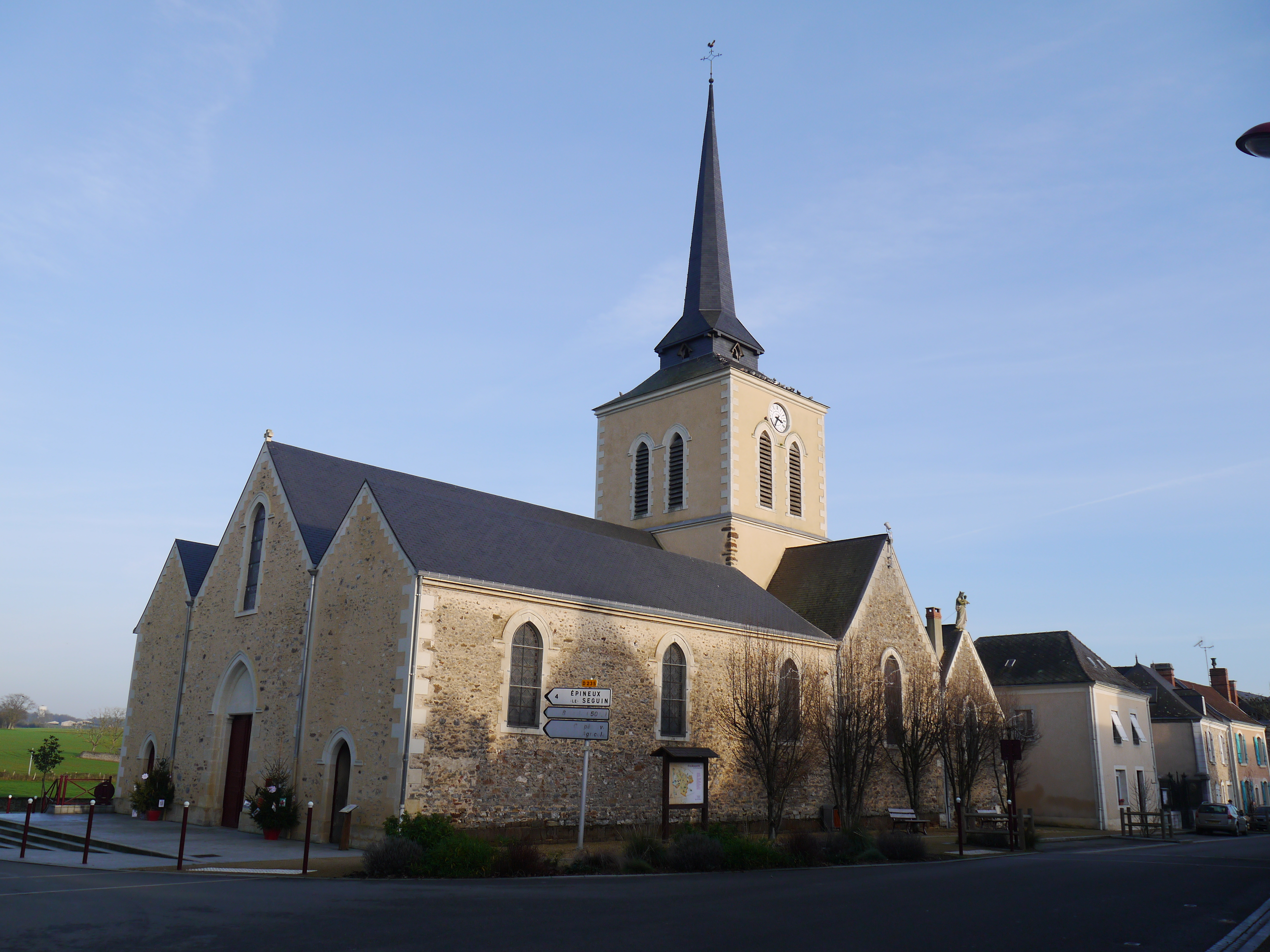 L'église Saint-Sulpice.